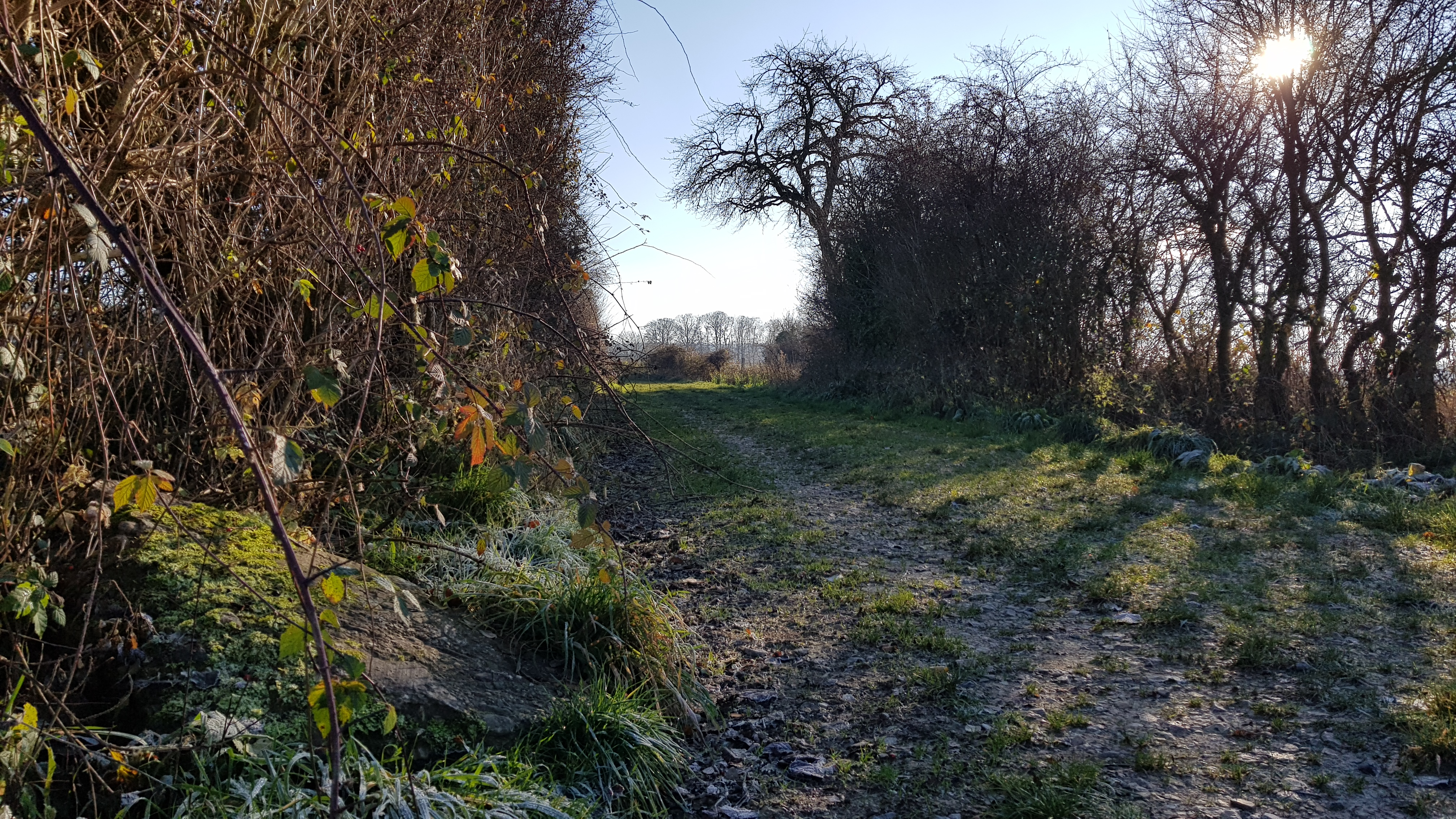 Menhir de Morville, Durbuy, Belgique